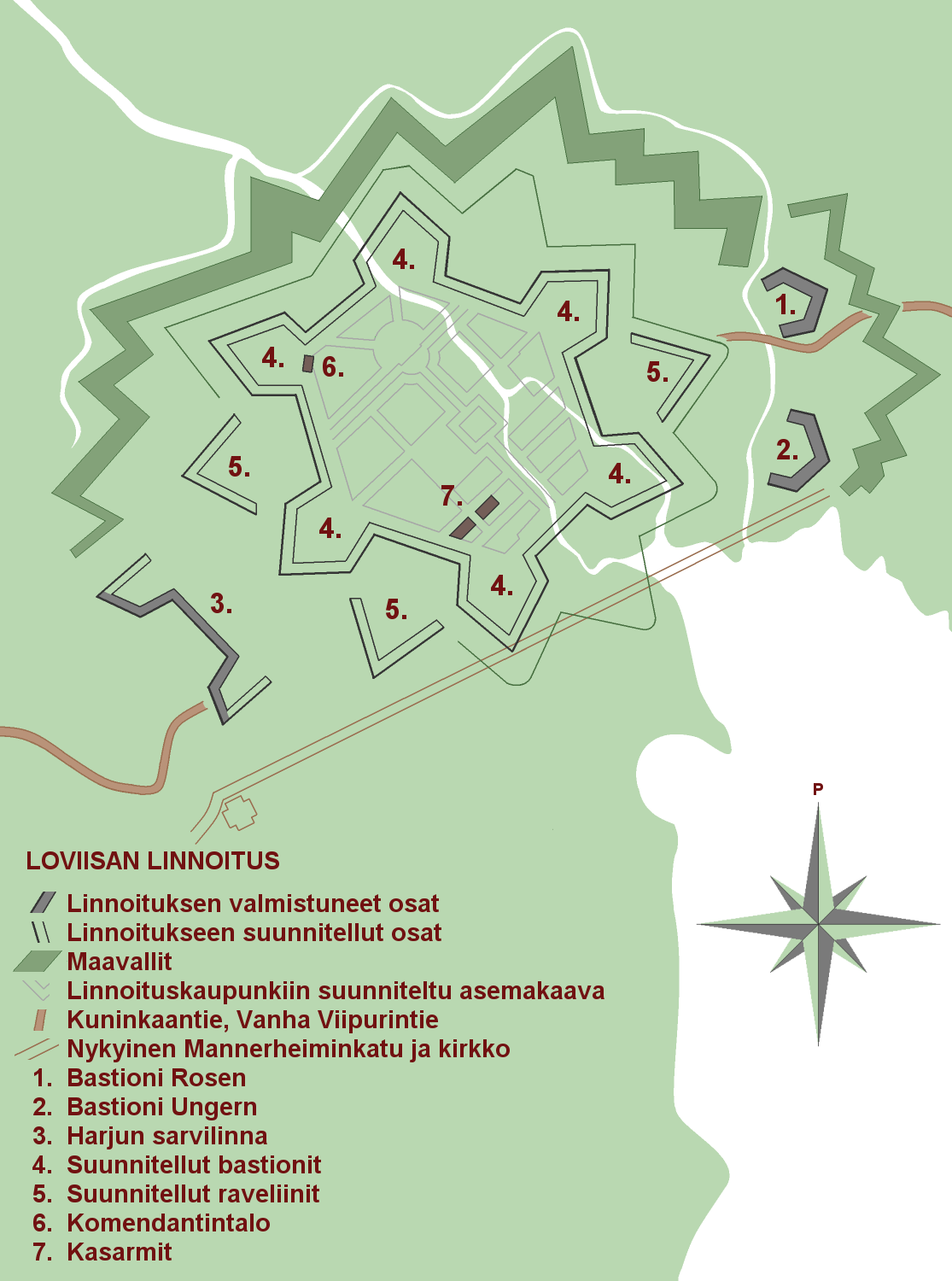 Keskeneräiseksi jääneen Loviisan linnoituksen pohjapiirros.